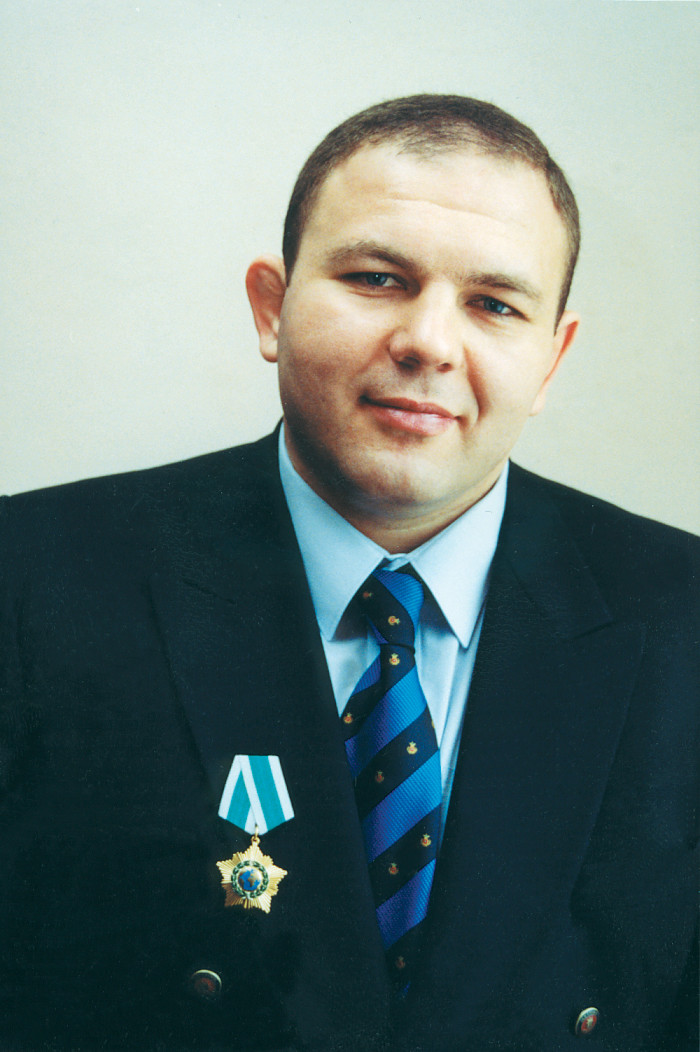 Орден Дружбы